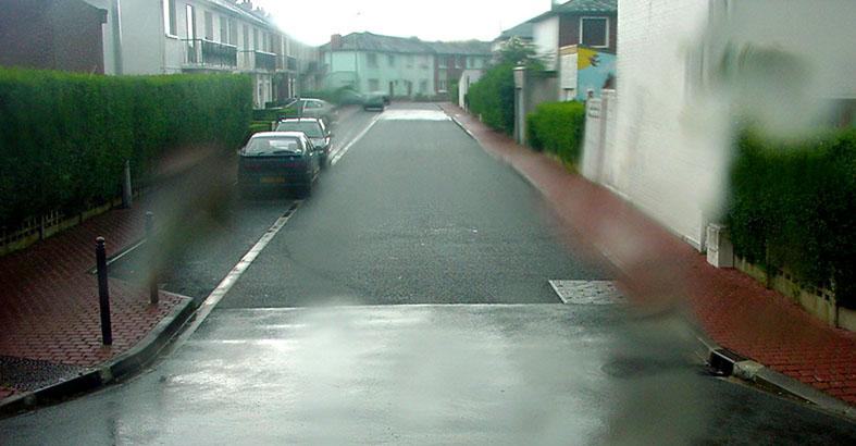 Dispositif de démonstration de l'association ADOPTA ; association Loi 1901 réunissant la ville de Douai, le Conseil régional du Nord Pas-de-Calais et l'Agence de l'eau Artois picardie, dédiée à l'expérimentation et à la prompotion de techniques alternatives de lutte contre les inondations et le ruissellement urbain. Même sous une forte pluie, on voit bien que la partie centrale (chaussée drainante absorbante) a absorbé la pluie. Les risque d'aquaplanning et de verglas y sont également diminués. Le trottoir et les places de parking sont également drainants avec une structure réservoir sous-jacente.